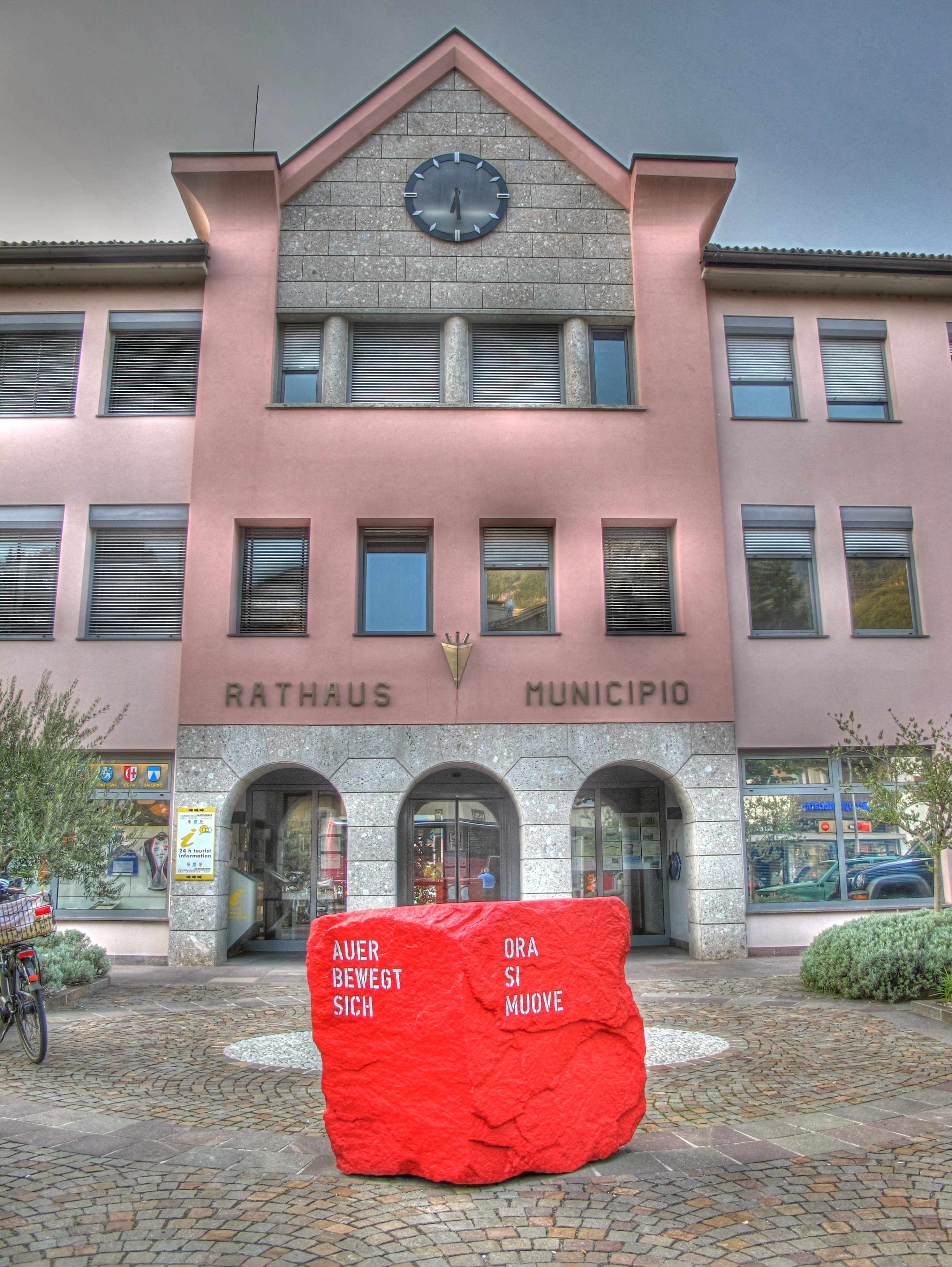 Italien, Südtirol, Auer, Rathaus